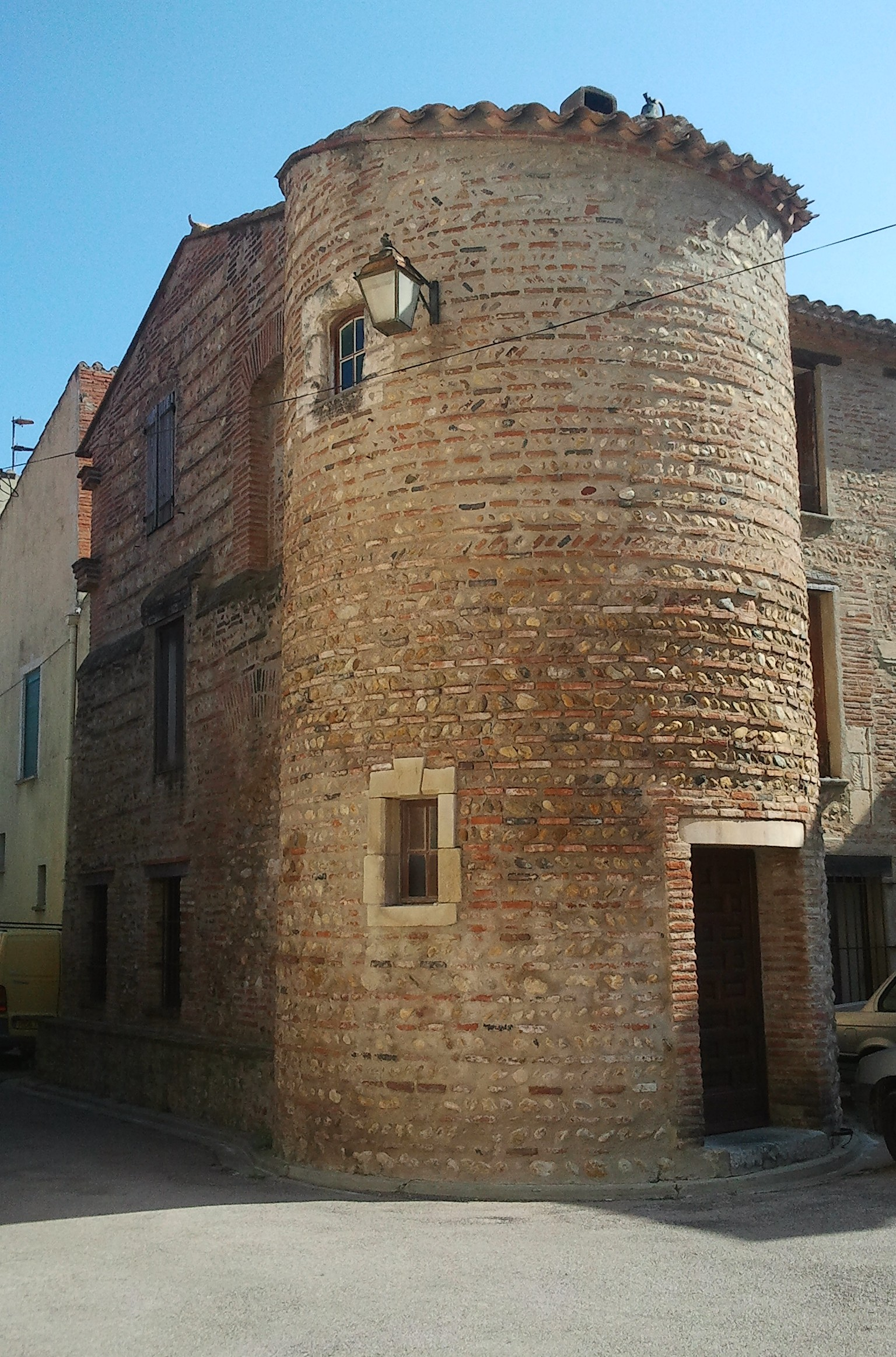 Tour de la rue du Couvent à Bompas